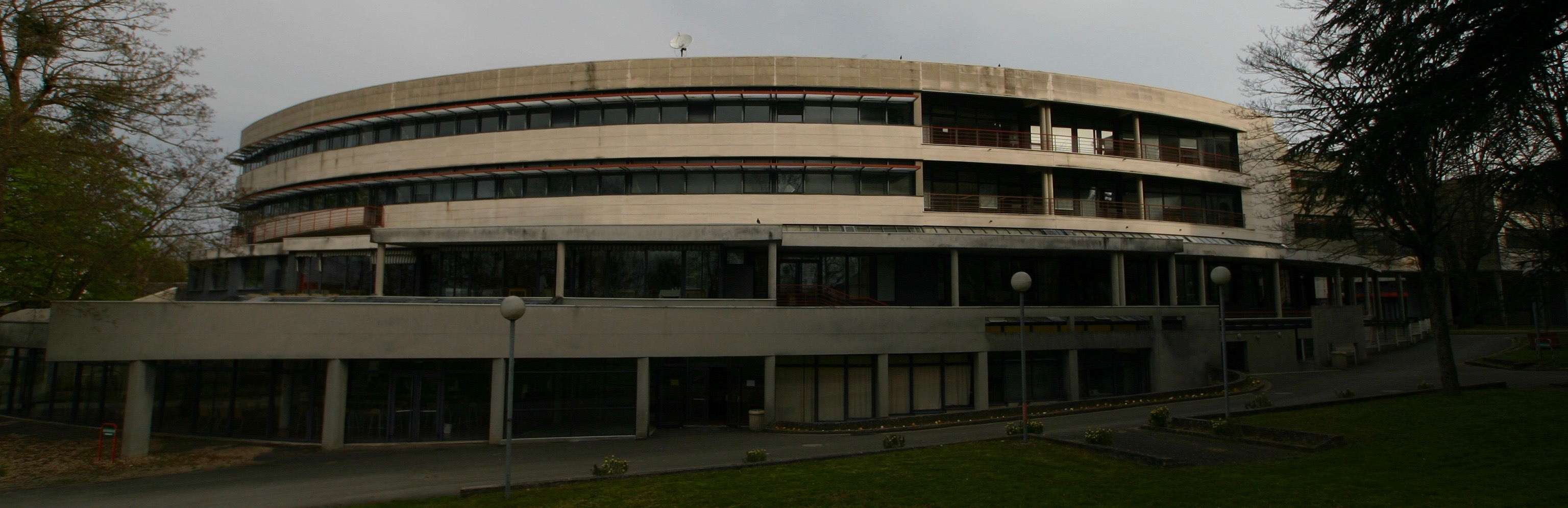 Bâtiment hôtellerie lycée Jacques Cœur, Bourges, France